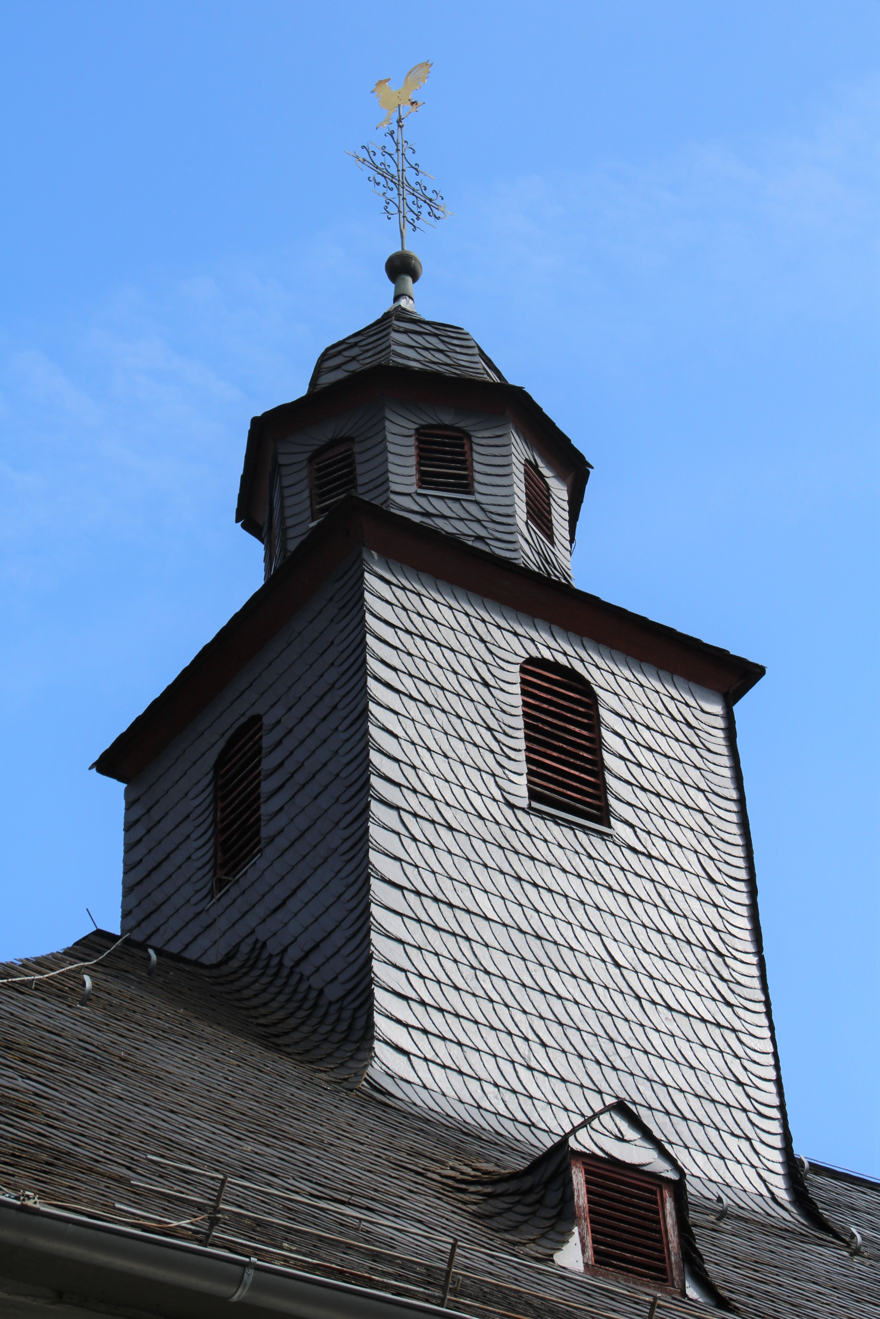 Ev. Kirche Nauborn, Wetzlar, Lahn-Dill-Kreis, Hessen, Deutschland